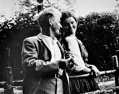 Arja Havakka Matti Salmelan kanssa Lappeenrannan kesäteatterissa vuonna 1961.